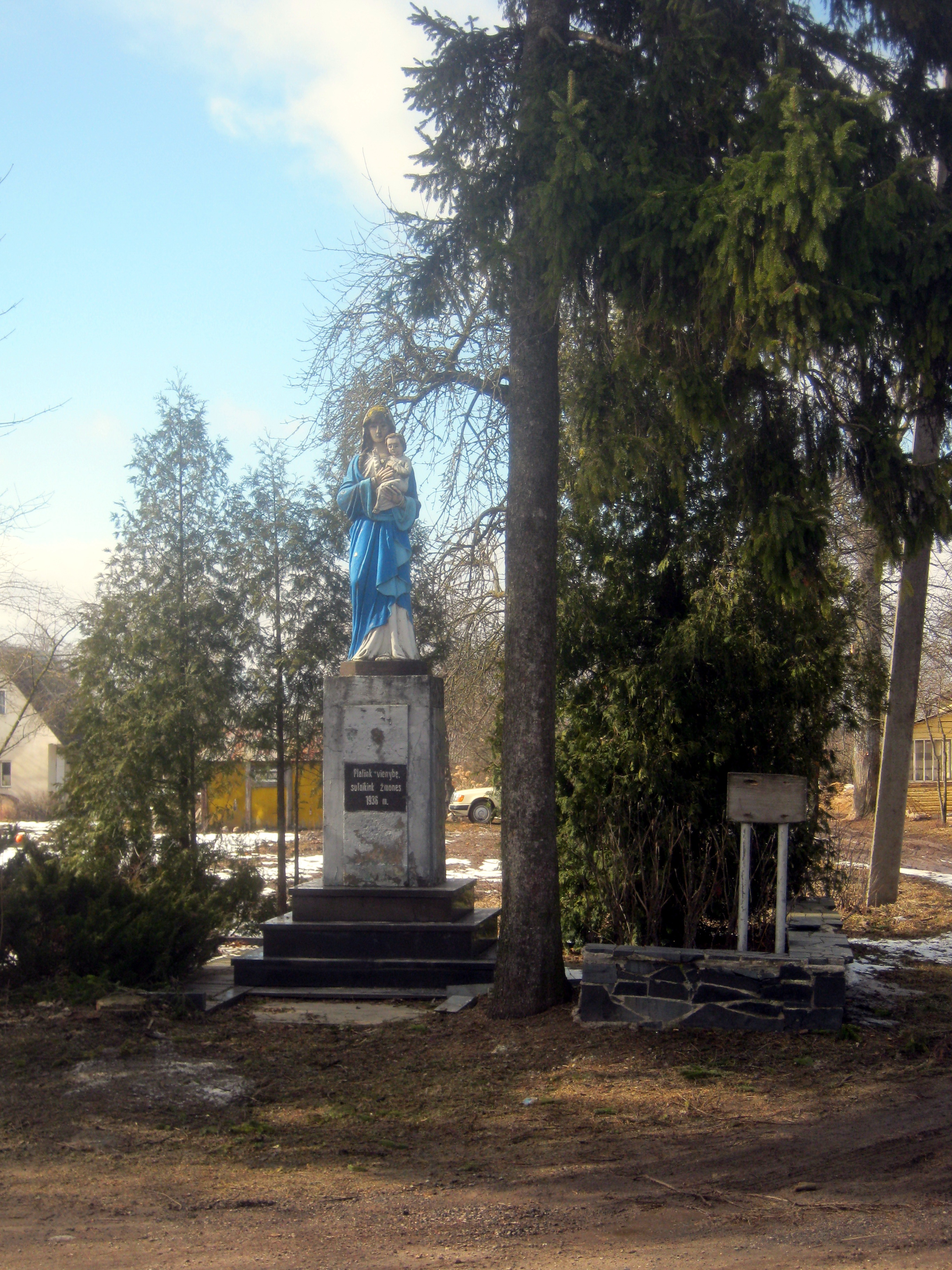 Žeimiai